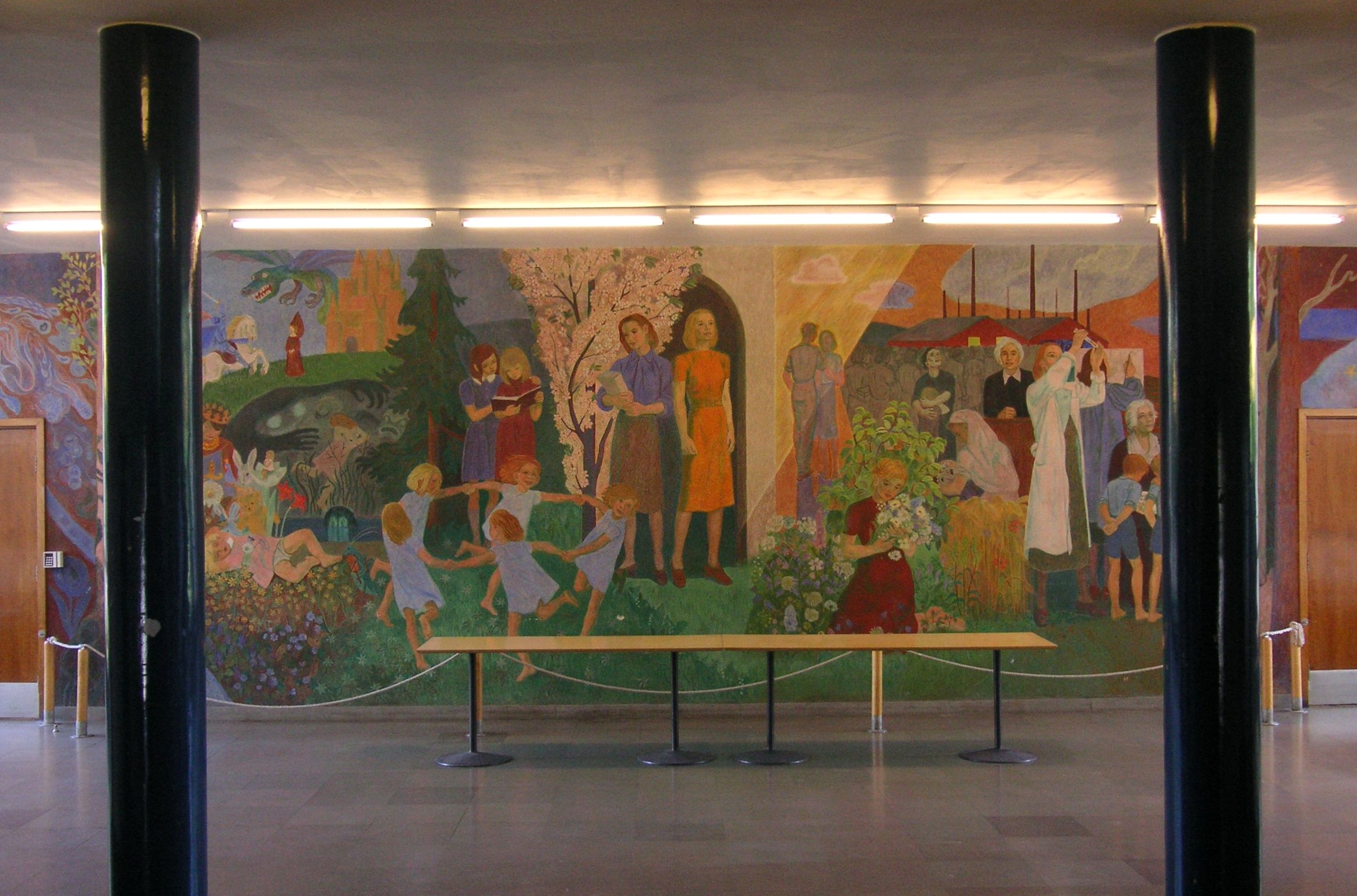 Sveaplans gymnasiun i Stockholm, entréhall, väggmålning av Bo Beskow 1939